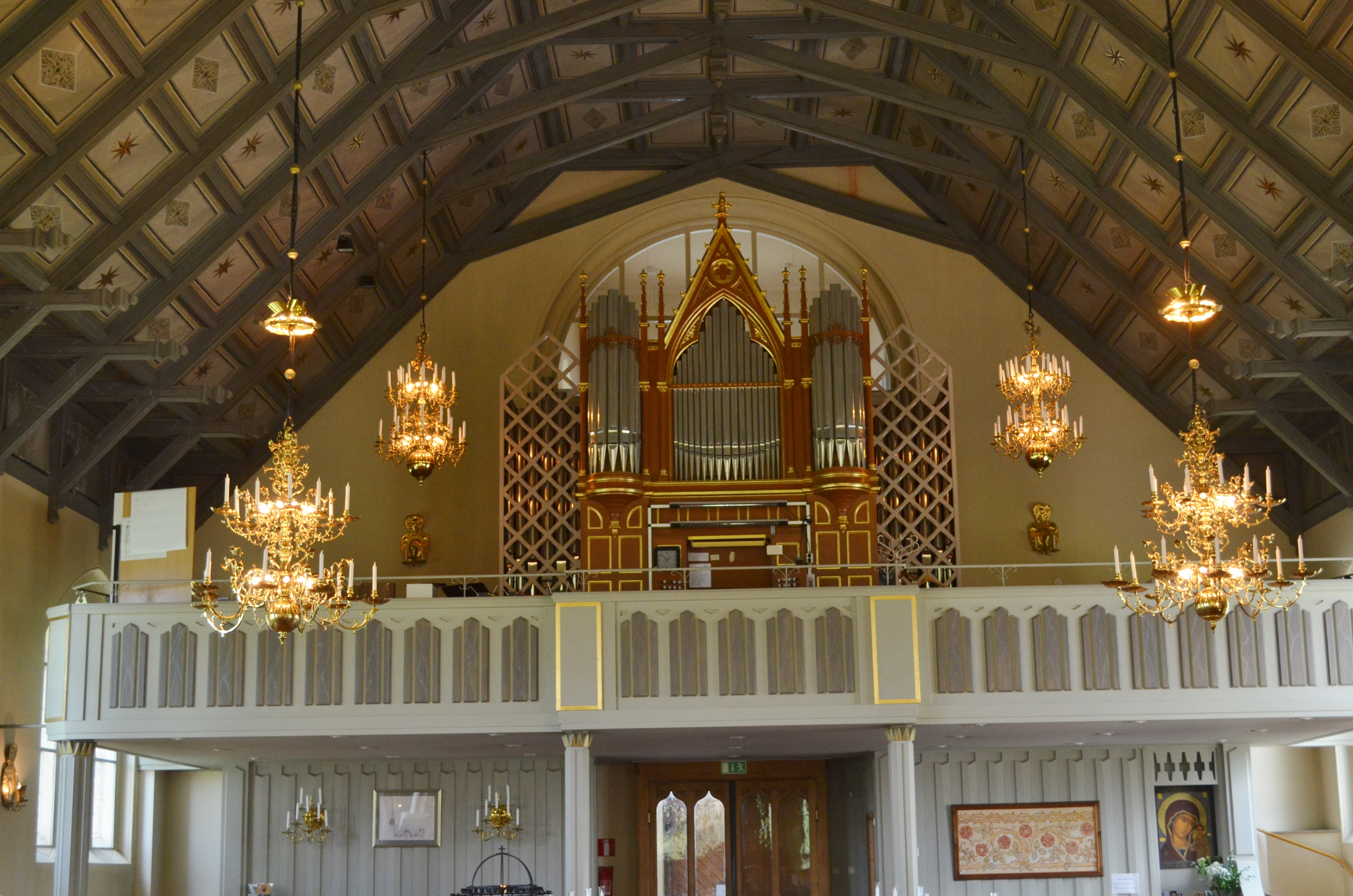 Orgelläktaren.